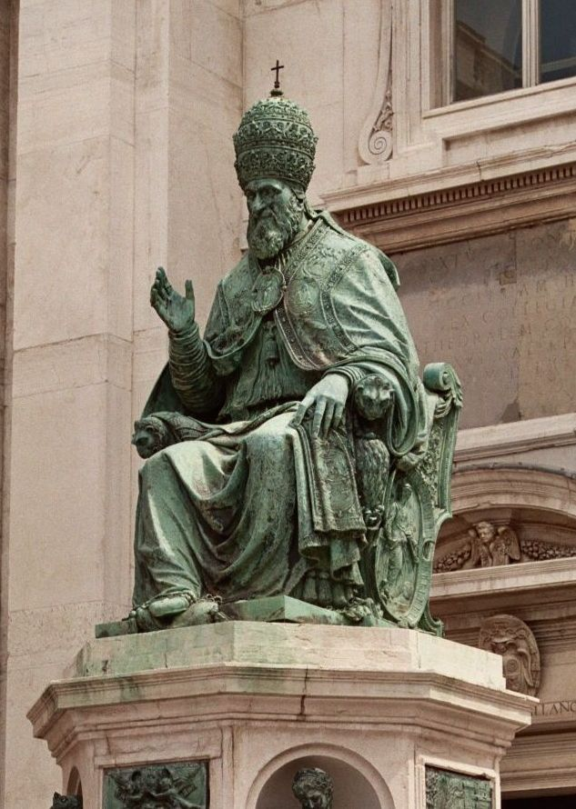 Statua bronzea di papa Sisto V a Loreto.